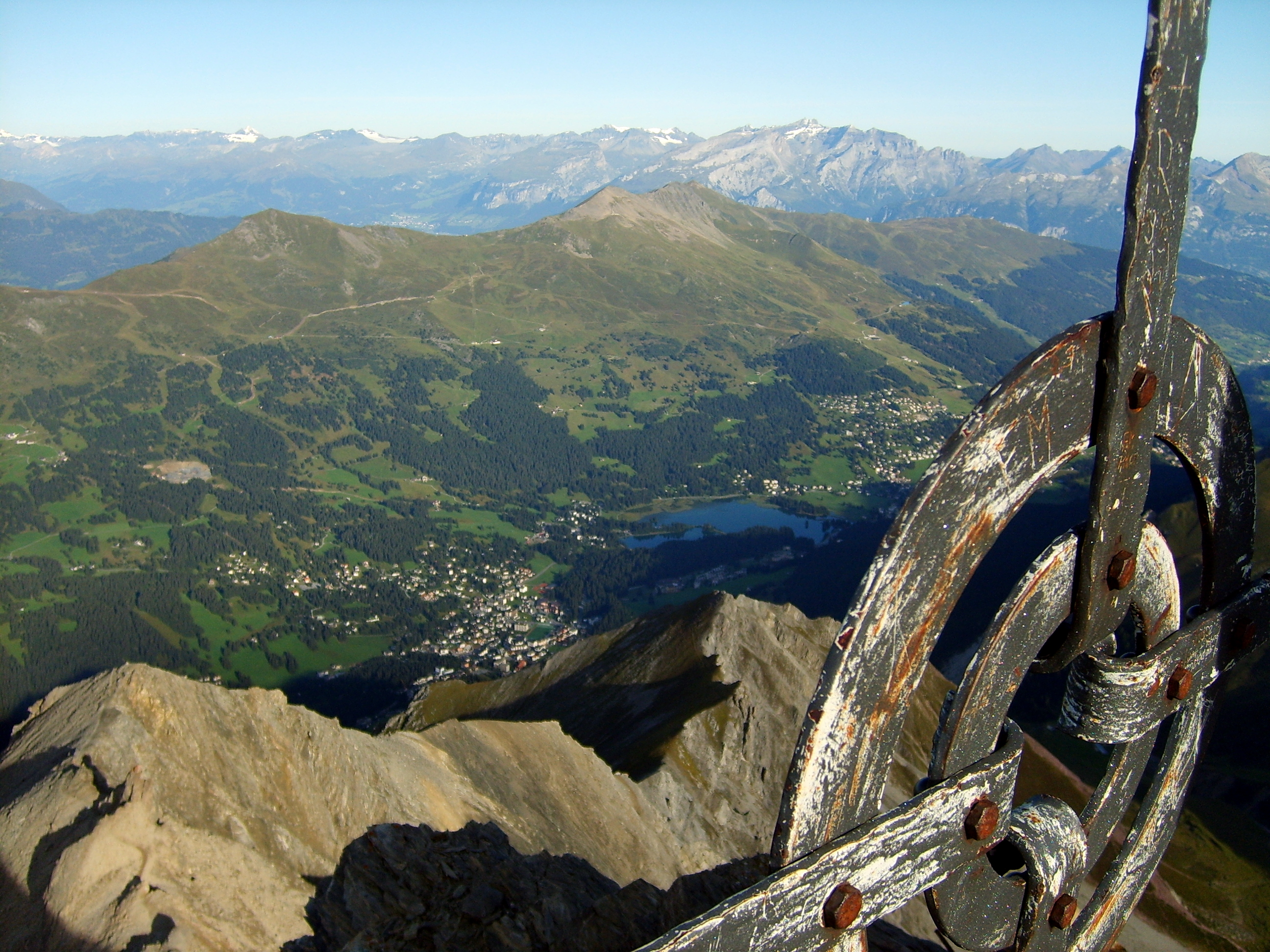 Lernzerhorn/Lenzerheide